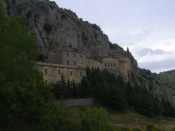 Santuario della Madonna della Armi - vista panoramica